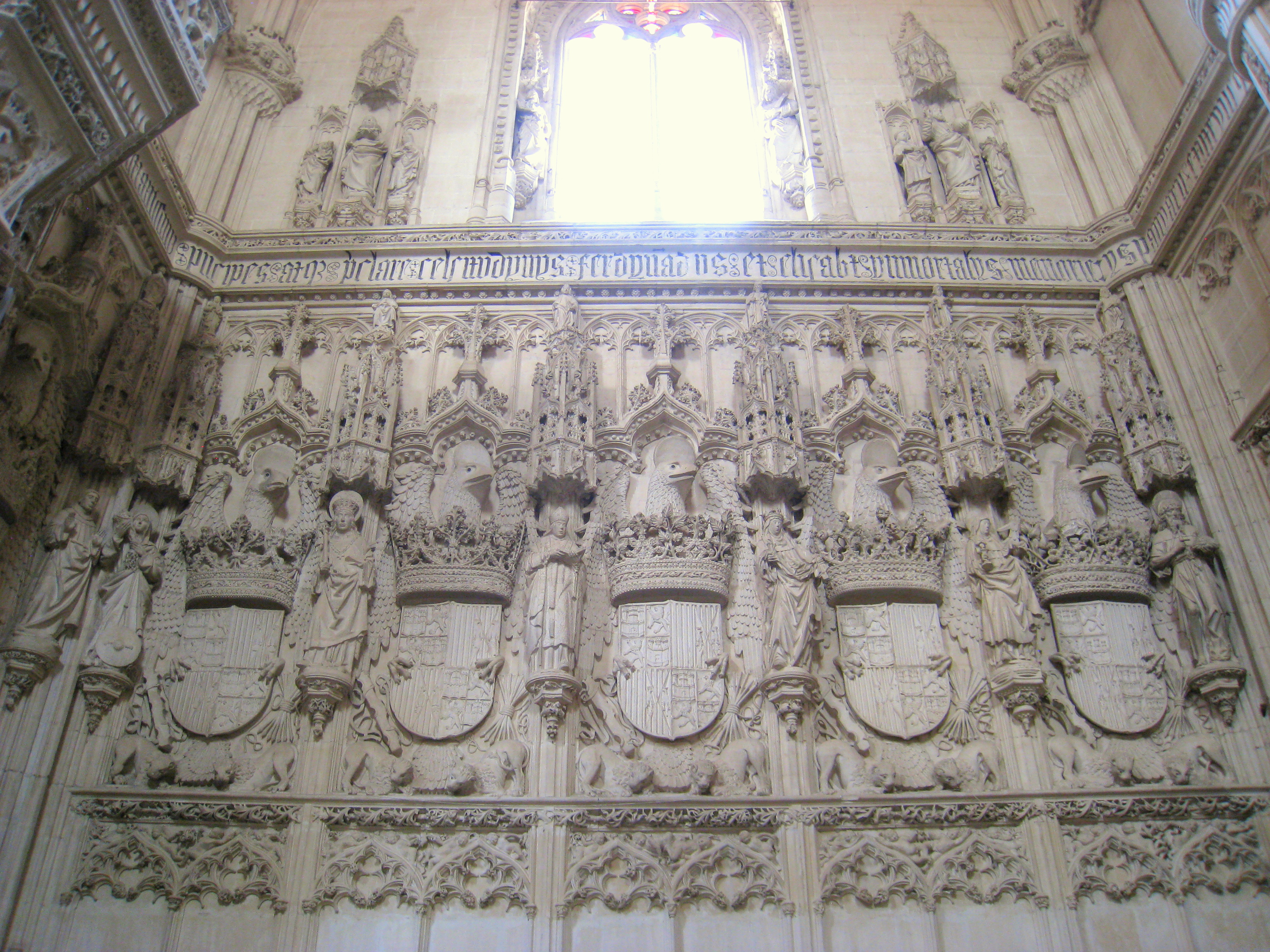 San Juan de los Reyes - Toledo, Spain.